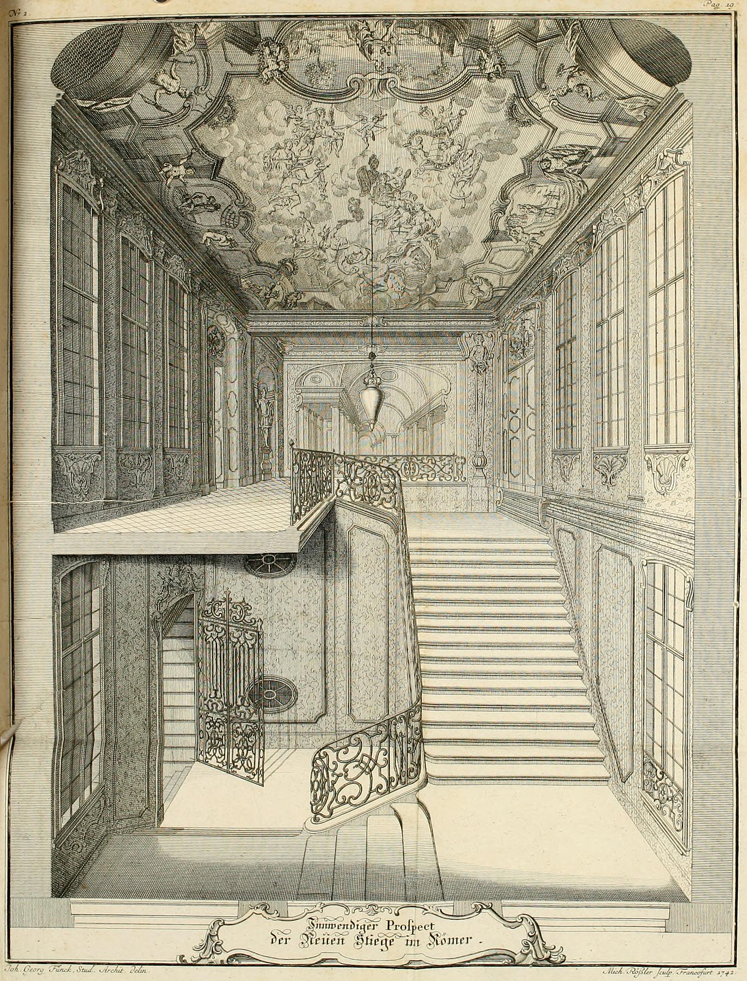 Frankfurt am Main, Römer, Kaiserstiege, Abbildung aus dem Krönungsdiarium Karls VII.